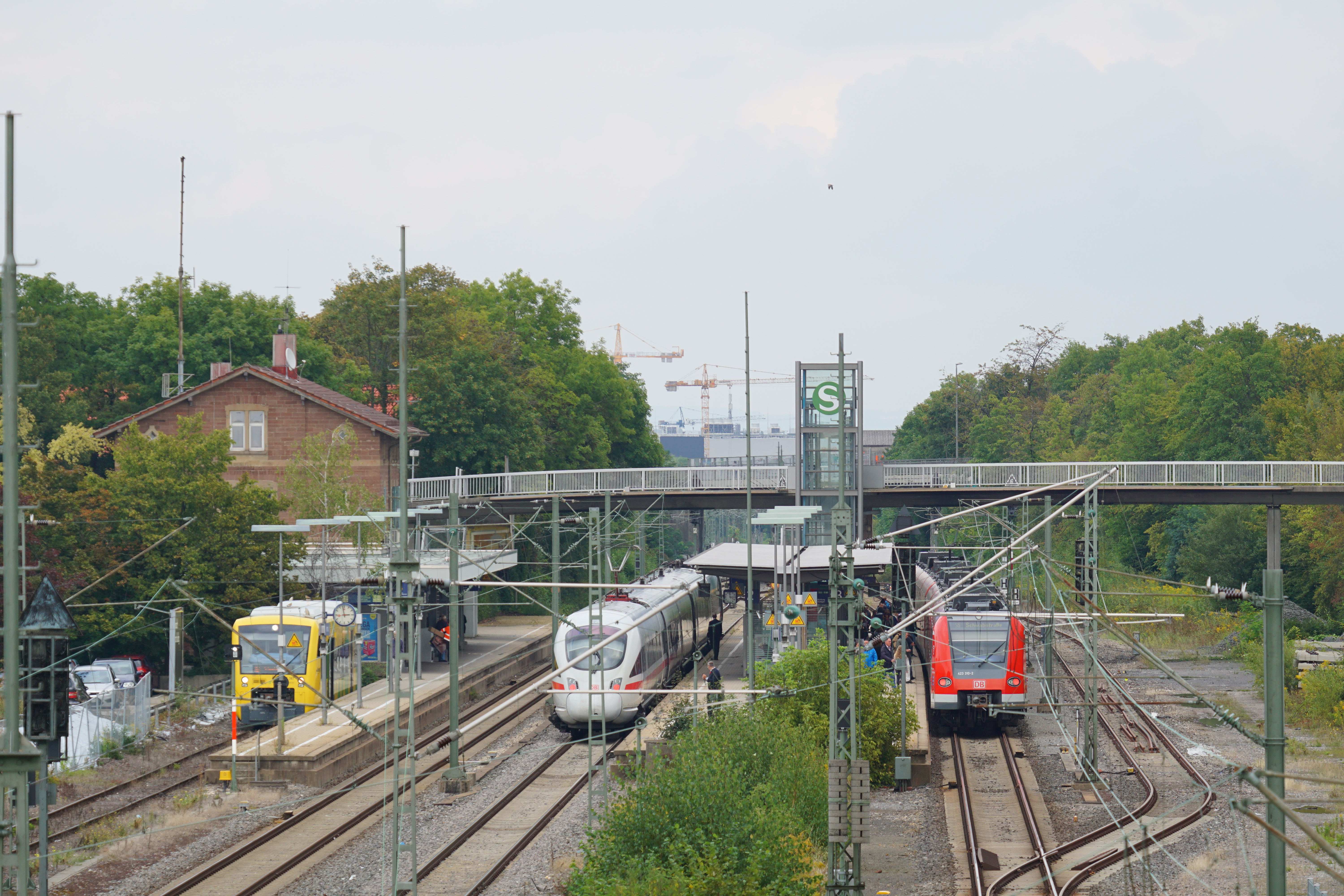 Bahnhof Korntal